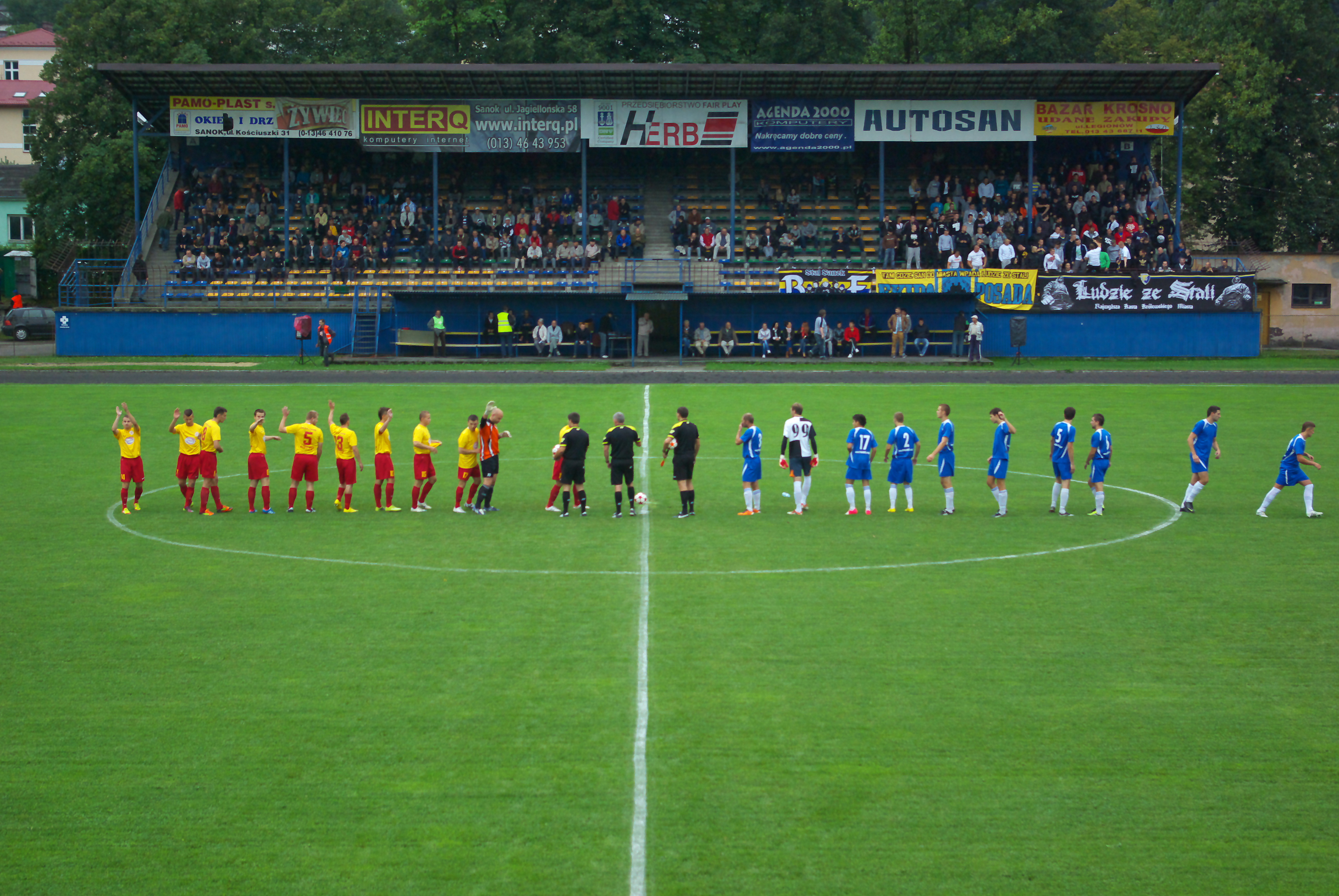 Stal Sanok - Orlęta Łuków 15.08.2012